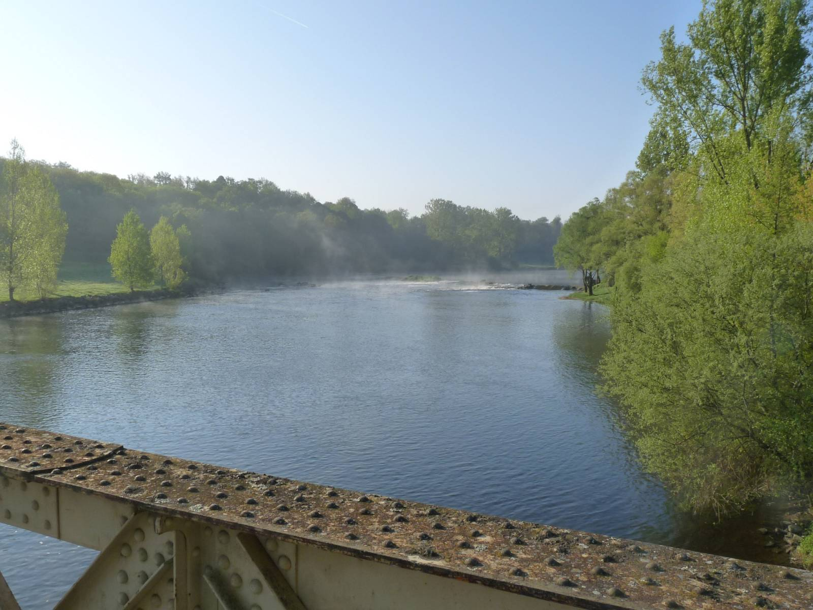 La Vienne vue vers l'amont à Ansac, Charente, France